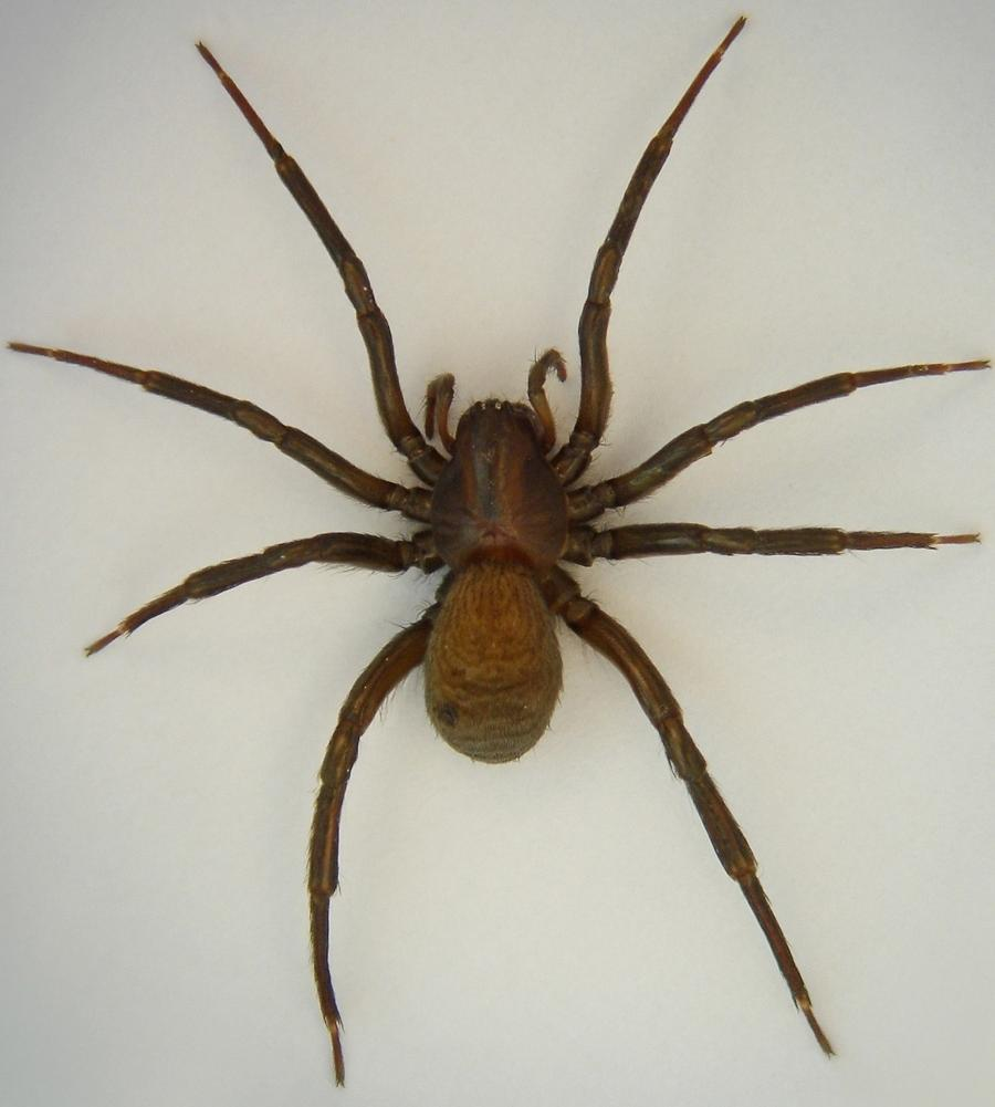 Weibchen der Wasserspinne Argyroneta aquatica. Fundort: Wien Prater. Landaufnahme.